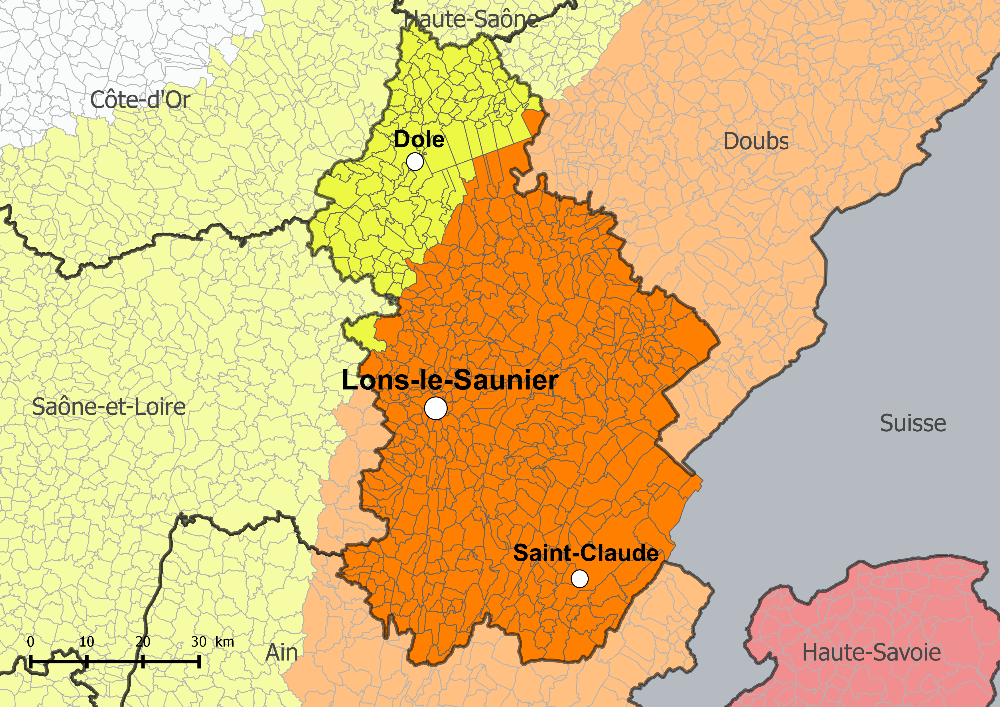 Carte du zonage sismique du département français du Jura.